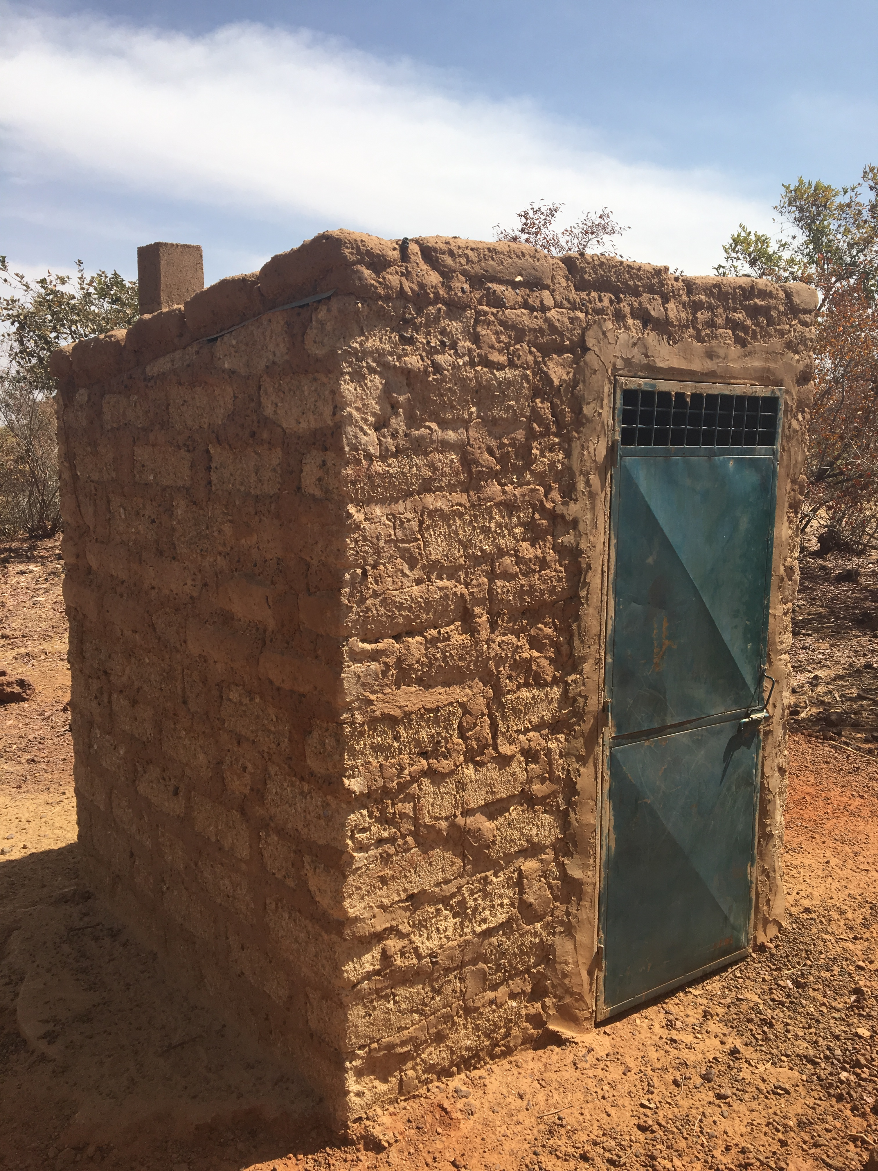 Latrine privée de Bogonam Mossi